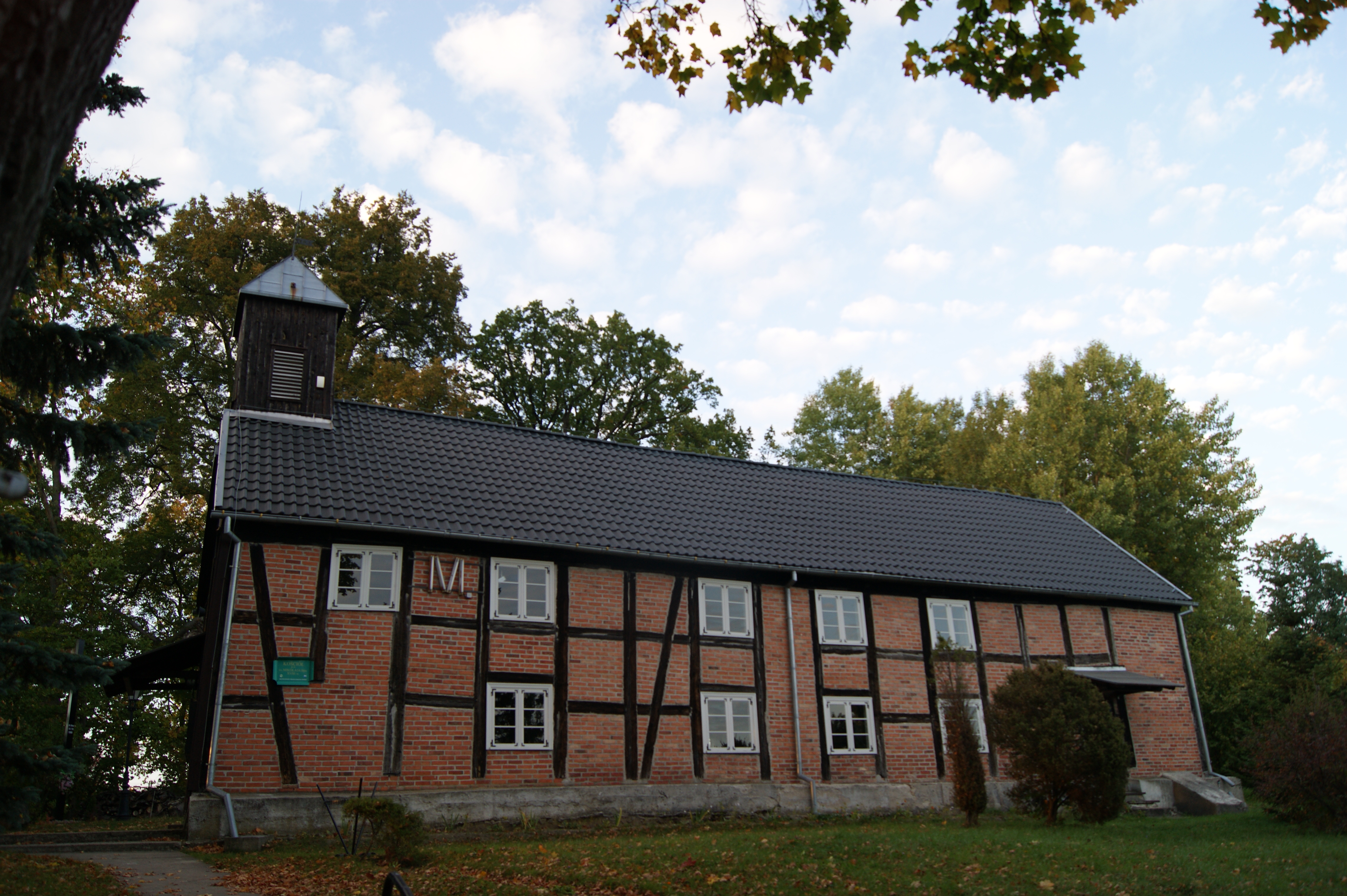 Kościół filialny p.w. Św. Mikołaja Biskupa w Czapelsku